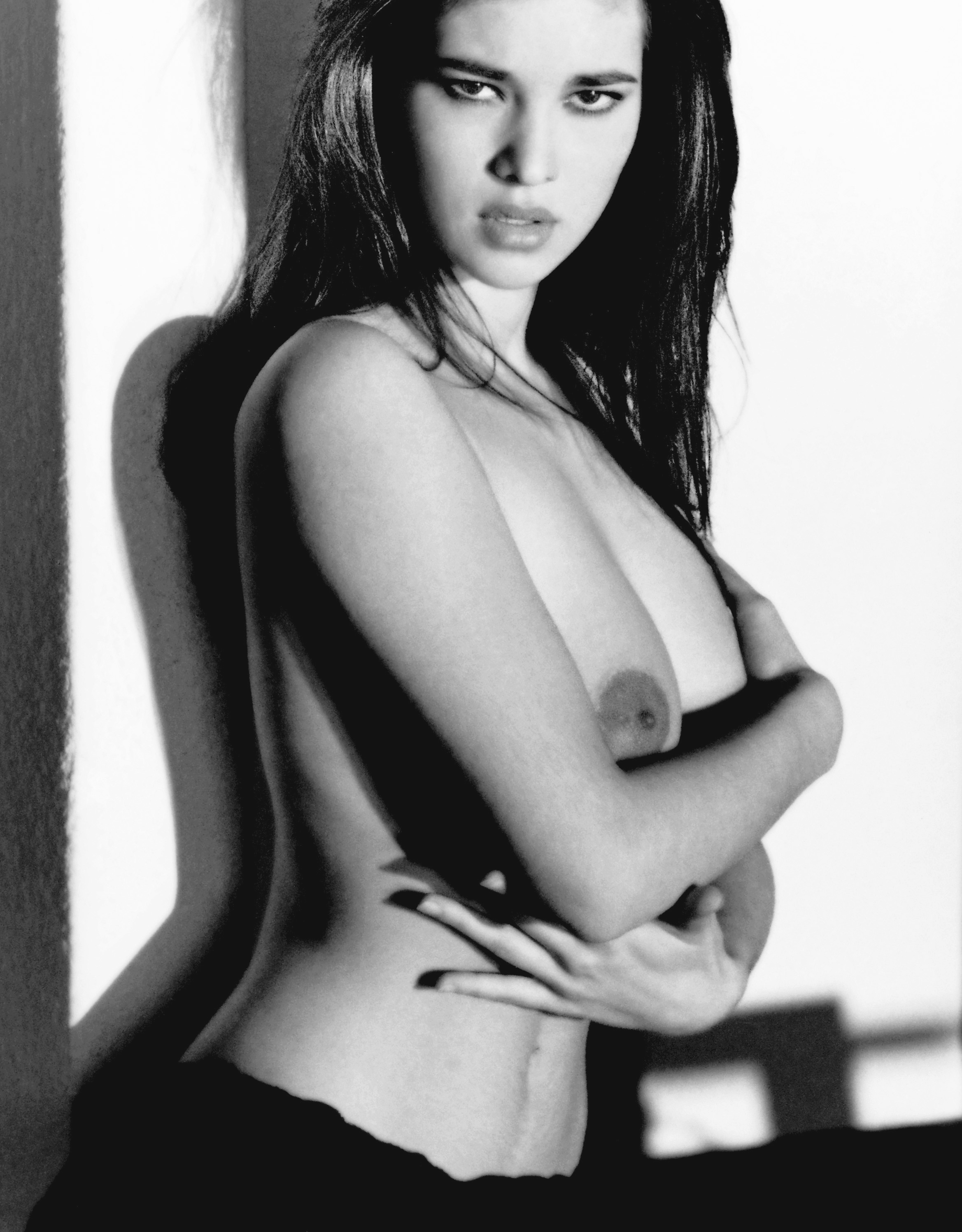 Manuela Arcuri, foto pubblicata nell'inserto dello speciale Play Boy 2000